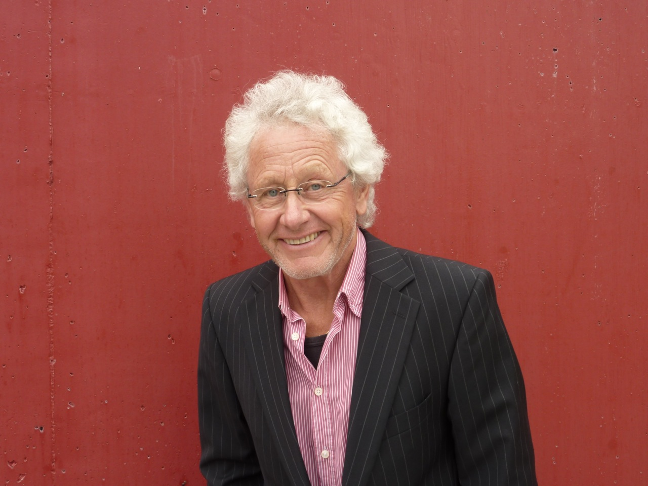 Osy Zimmermann, Schweizer Sänger, Musiker und Schauspieler